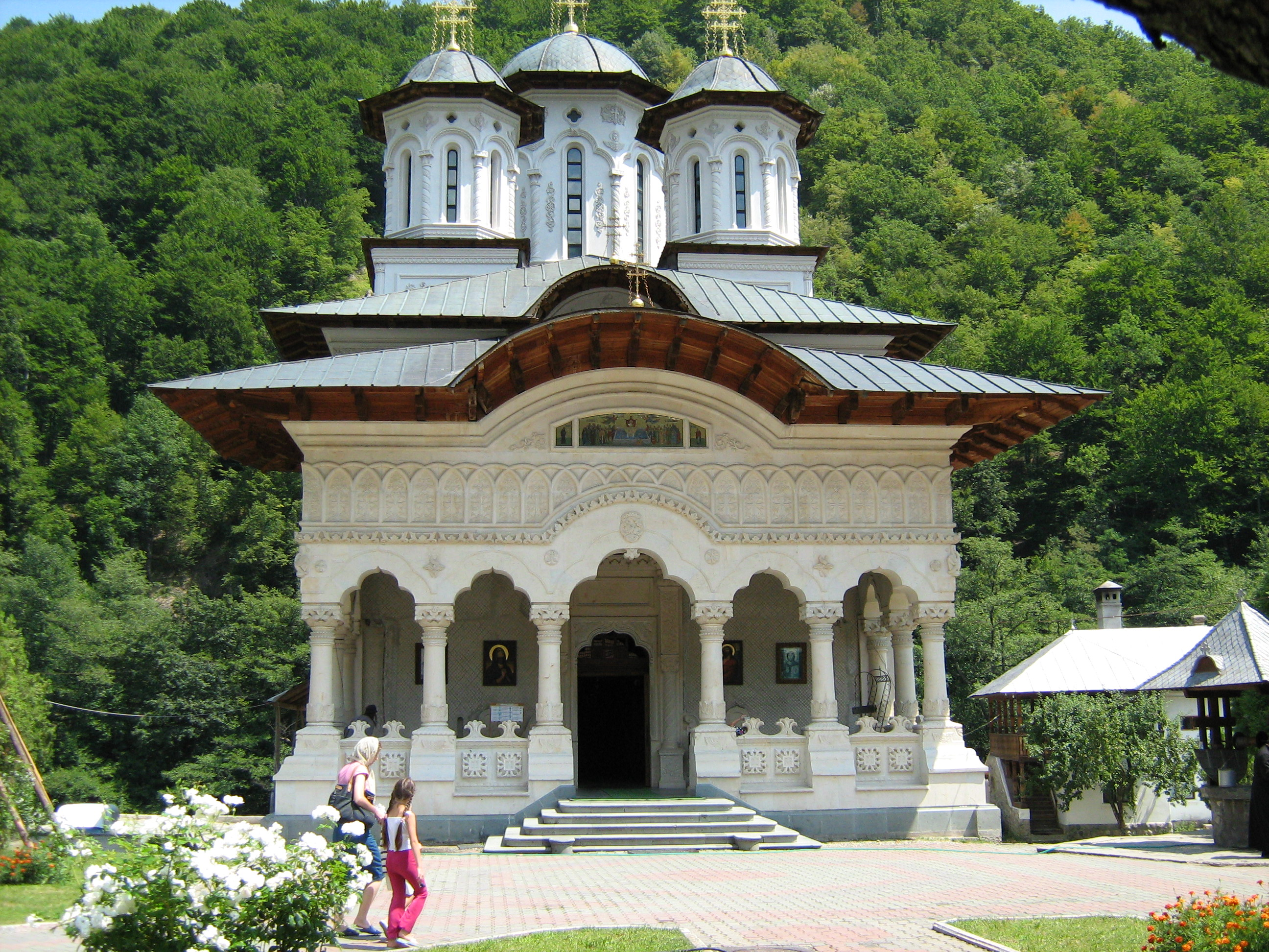 Mănăstirea Lainici